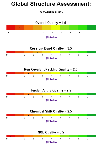 PROSESS main report page